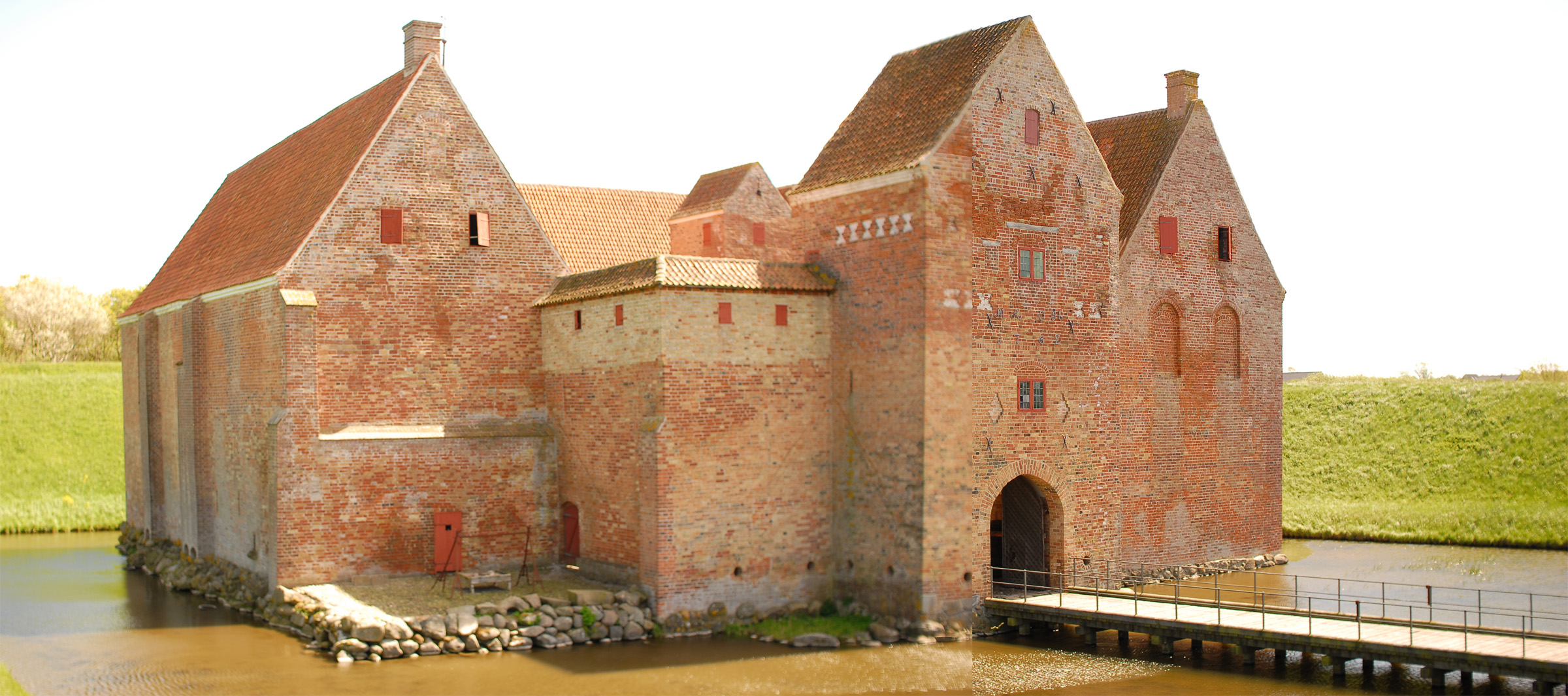 Burg Spøttrup, Ansicht vom Wall